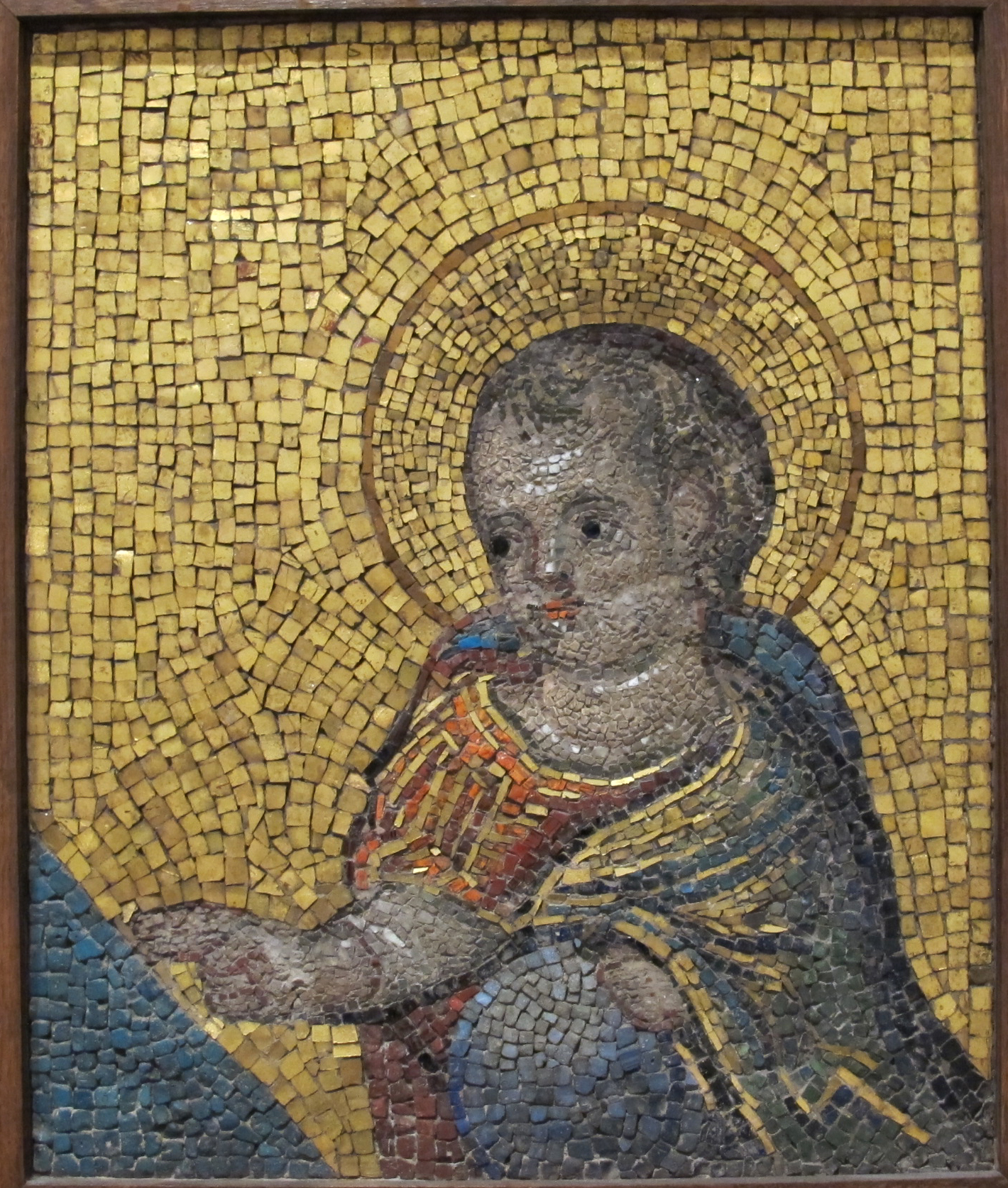 frammento